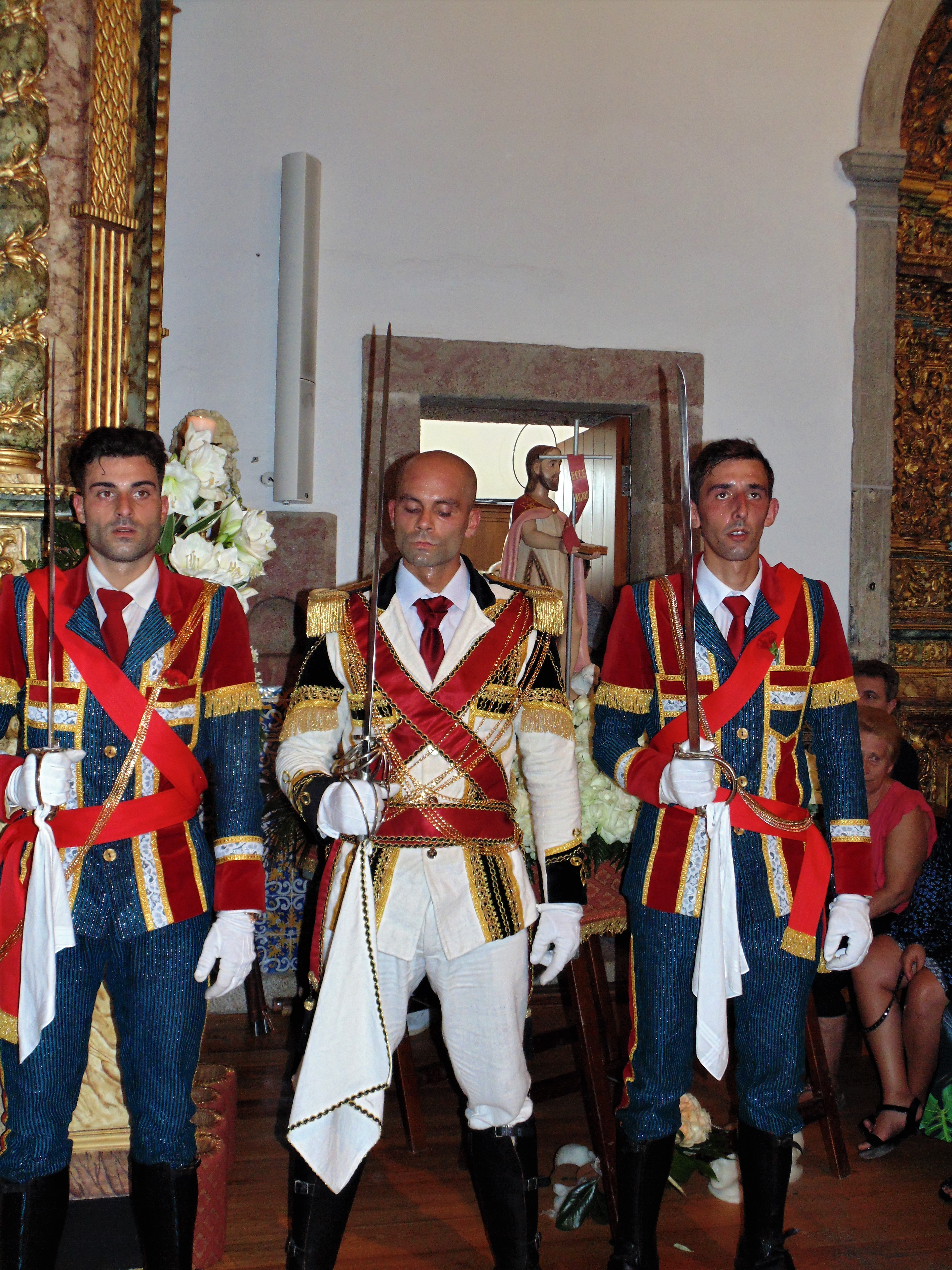 Roubo do Santo